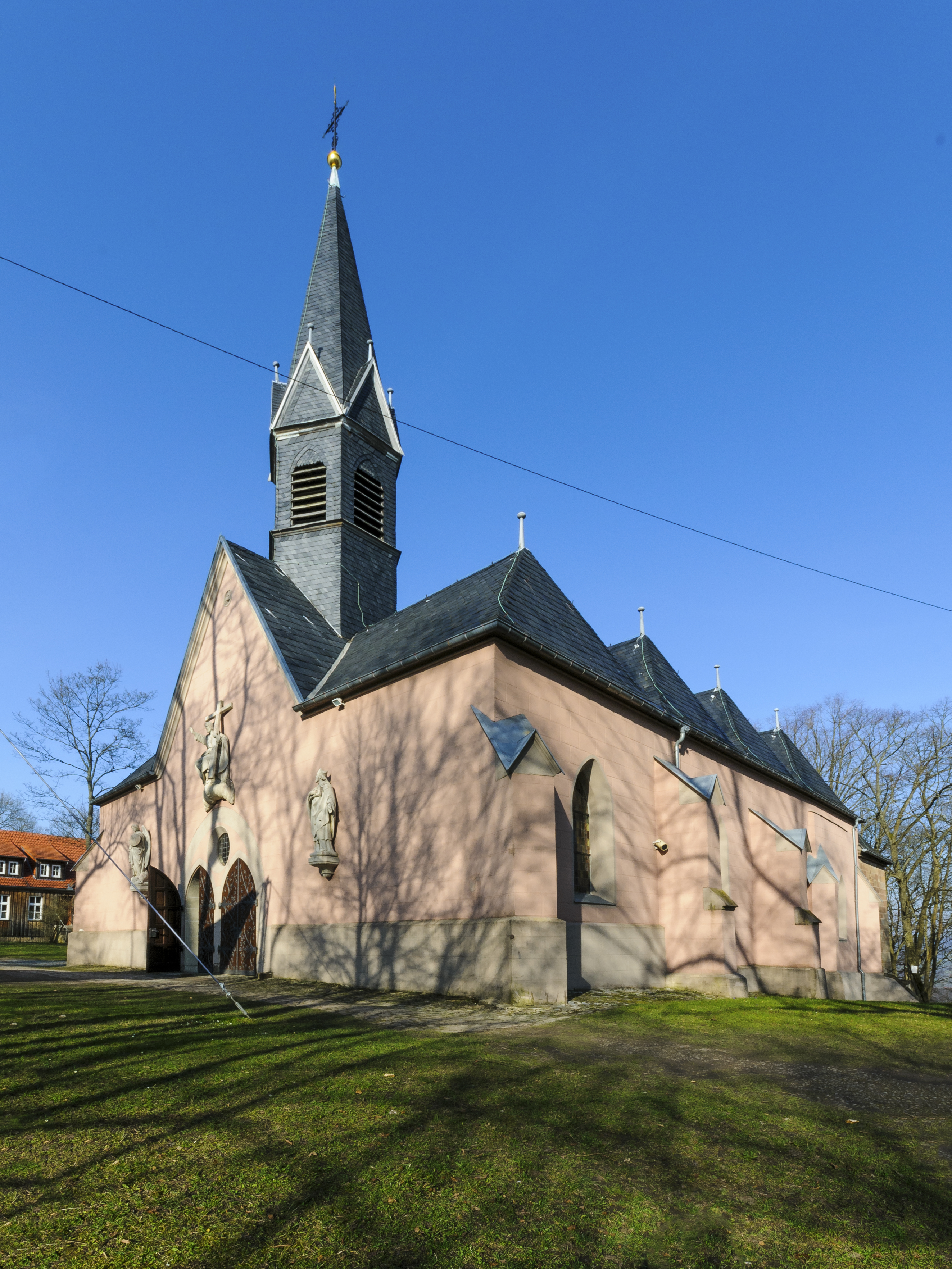 Erlöserkirche St. Salvator auf dem Hülfensberg